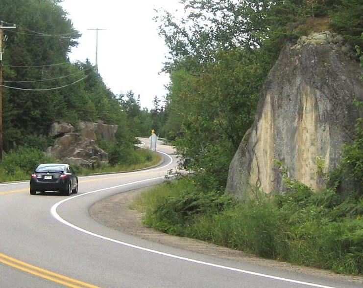 La grosse roche à Tewkesbury Qc Canada